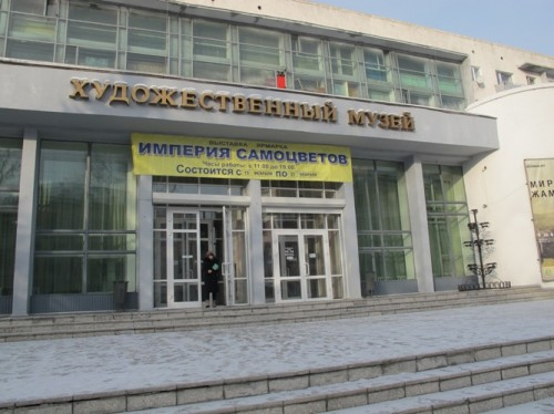 фото музея им. Сампилова